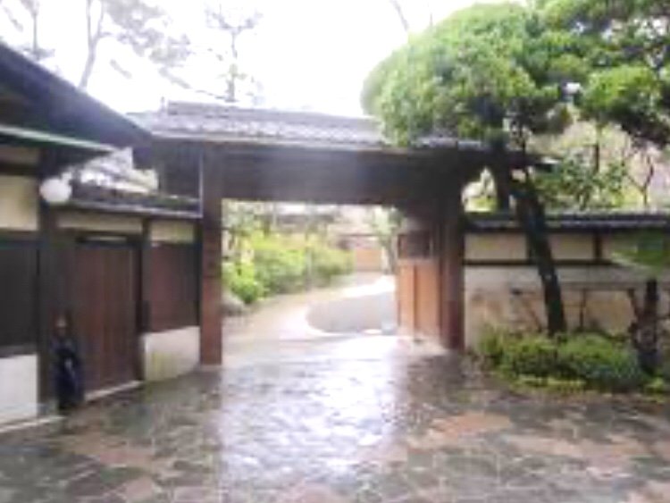 日本生命創業者 弘世助三郎 邸宅の正門